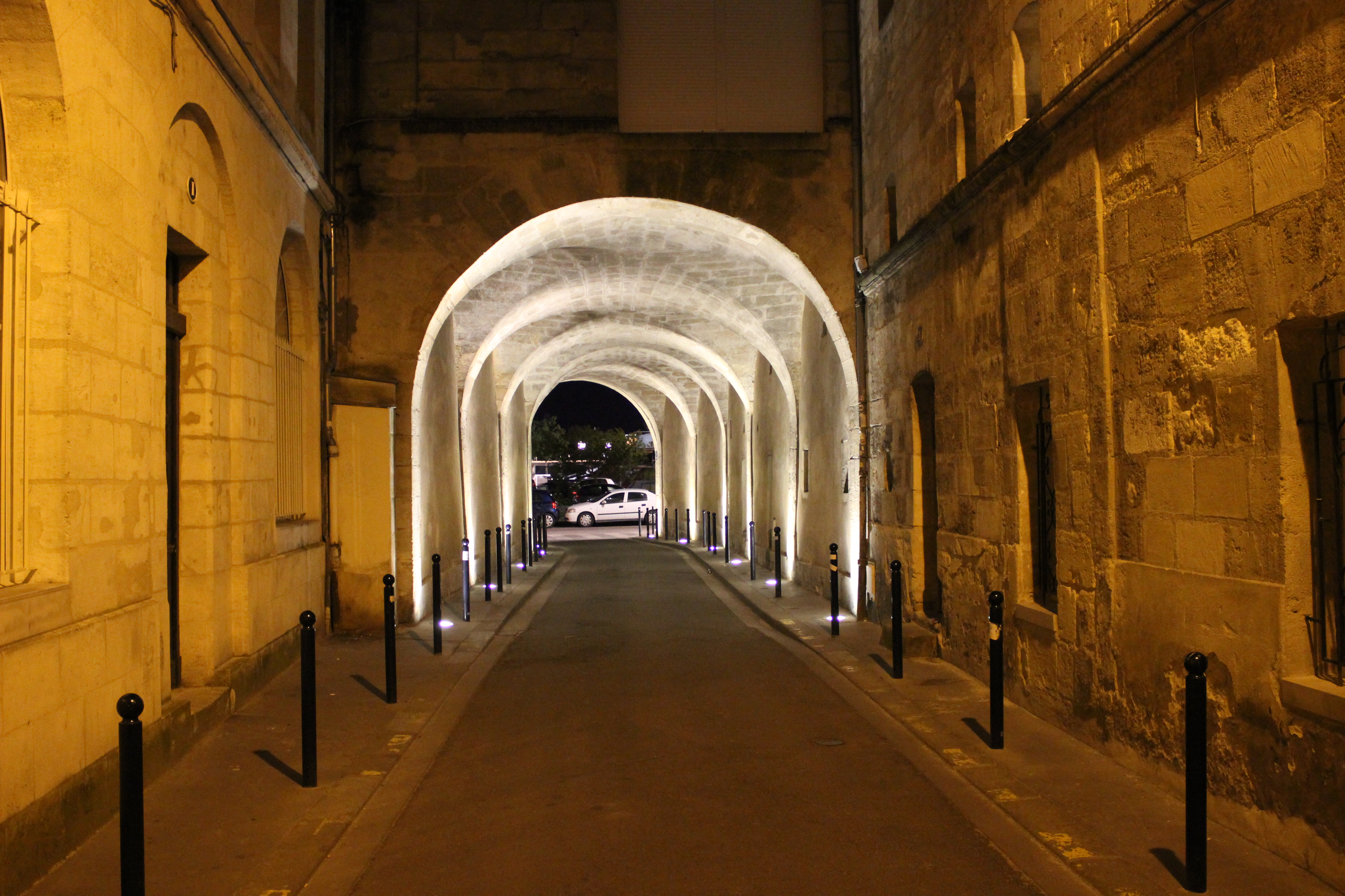 Chartrons, Bordeaux, France